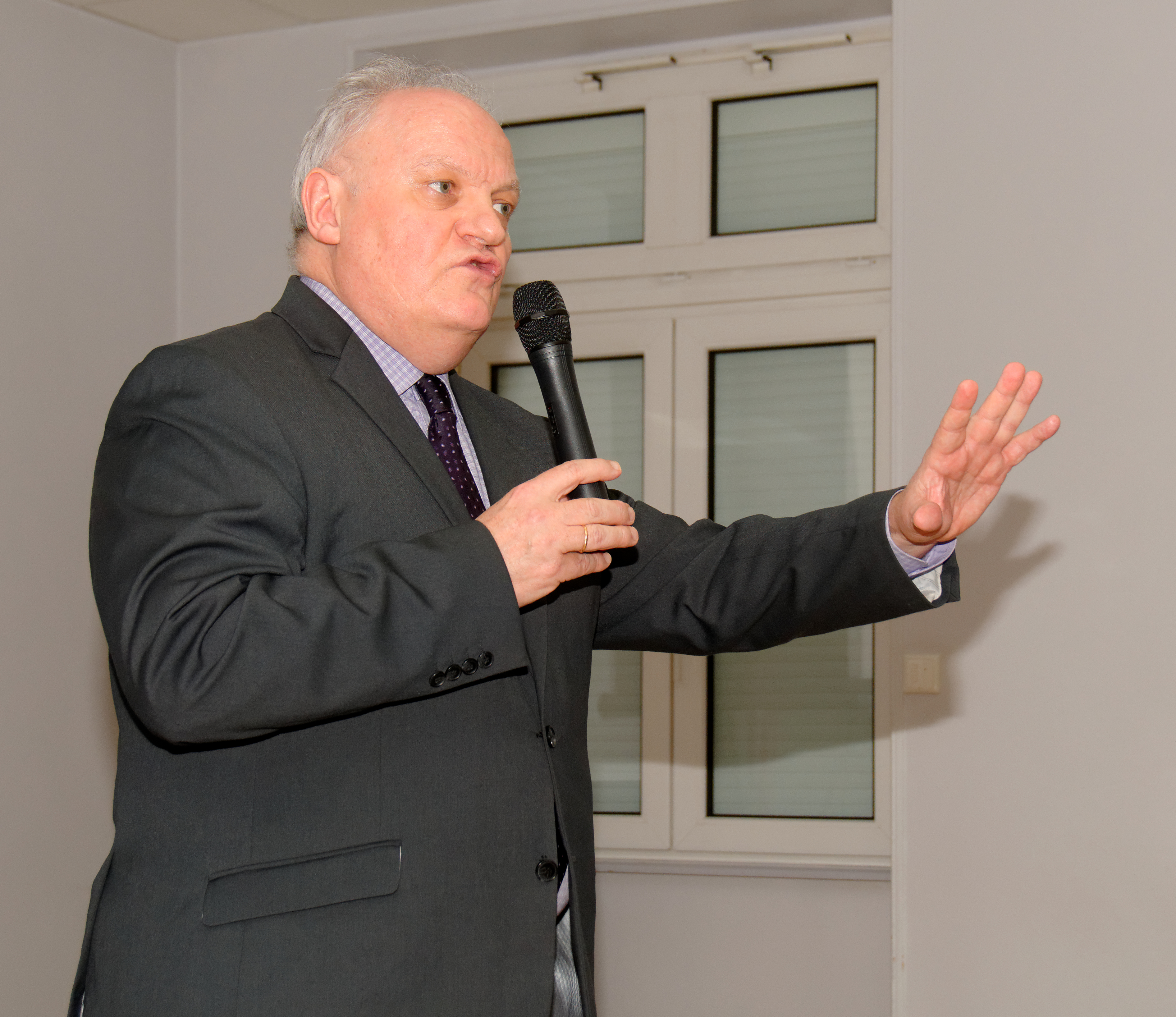 Conférence de François Asselineau, au centre social Renée Lods, à Audincourt, ayant pour sujet « Mais qu’arrive t-il au Doubs et à la France » : François Asselineau.